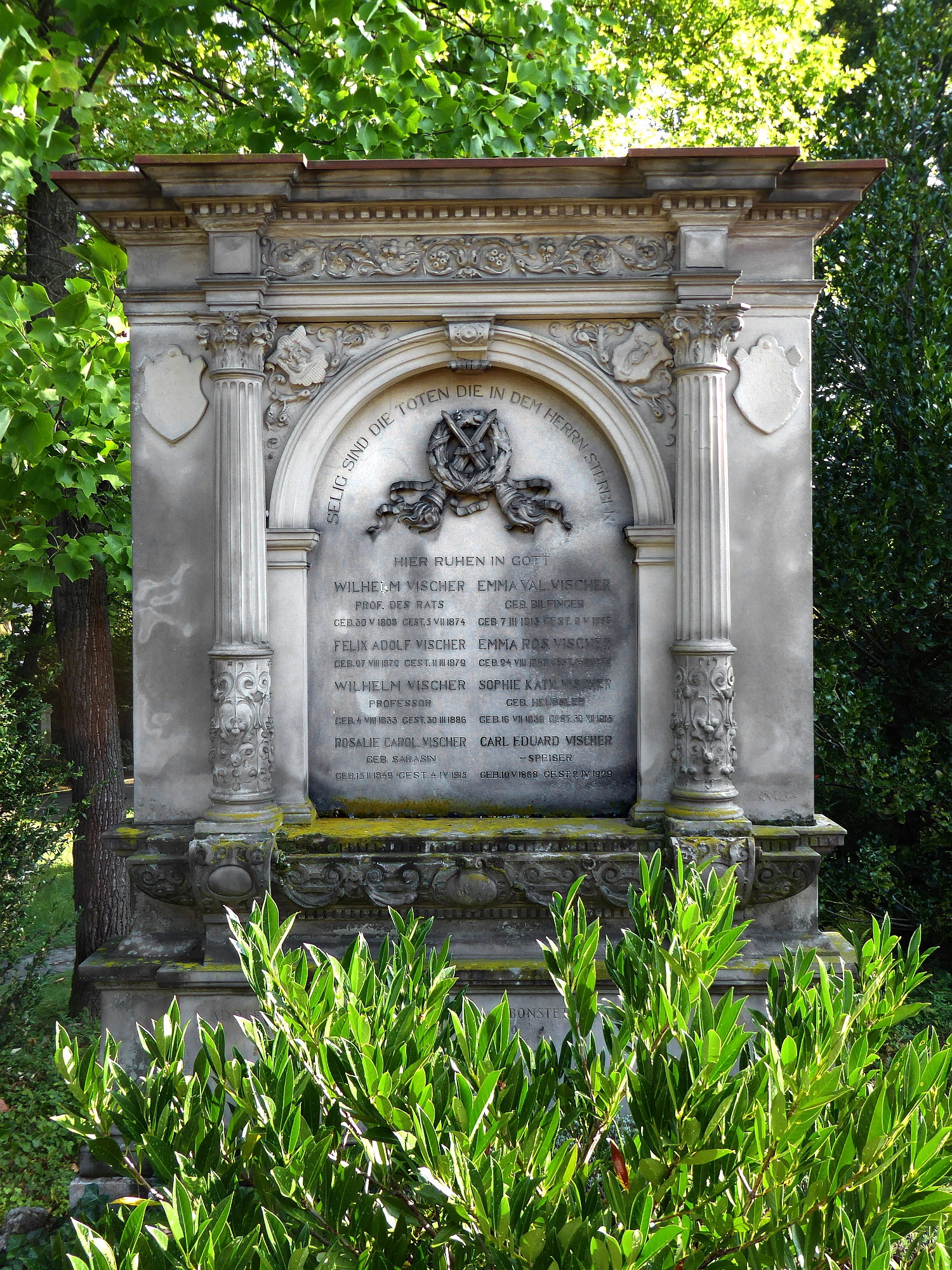 Wilhelm Vischer-Bilfinger 1808-1874, Friedhof Wolfgottesacker, Basel